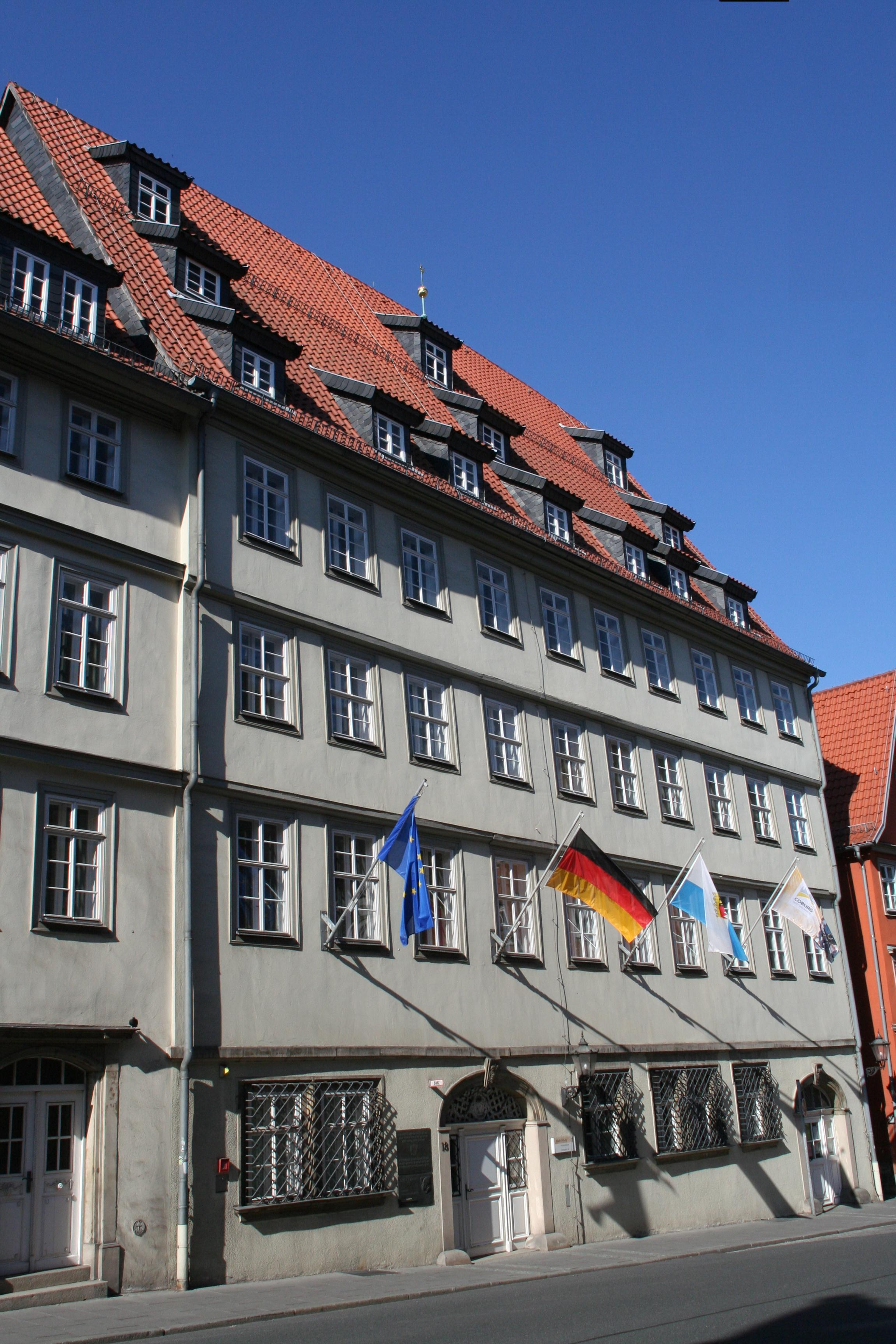 Steingasse 18 in Coburg